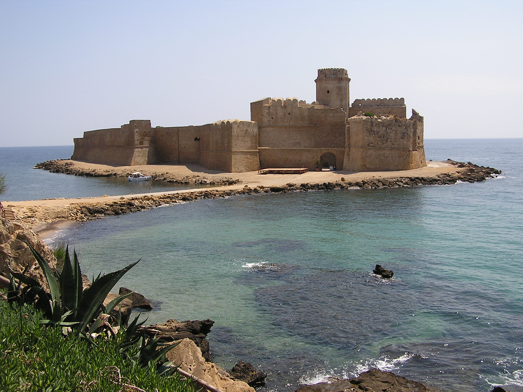 Le Castella